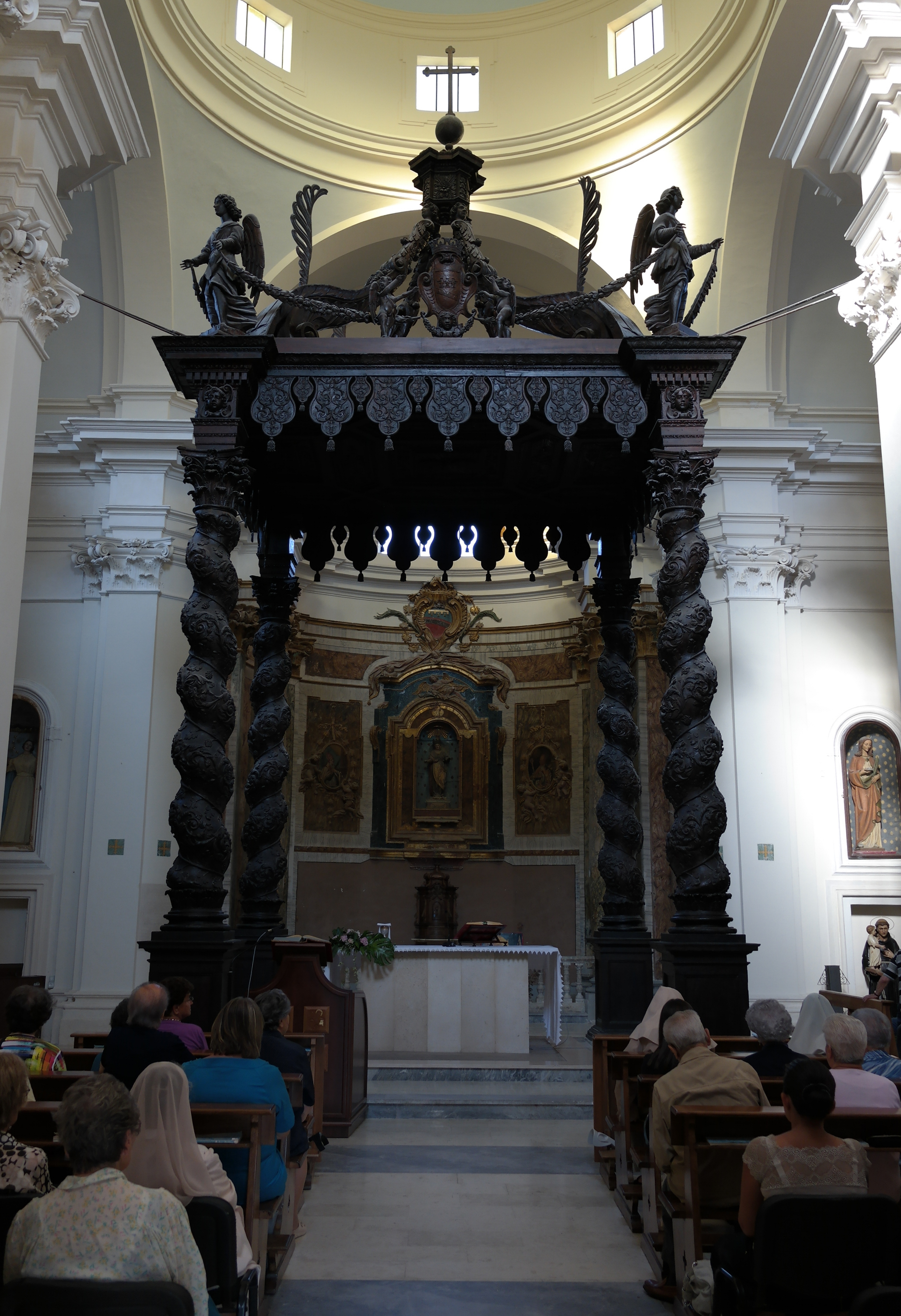 Chiesa di santa Reparata ad Atri, interno